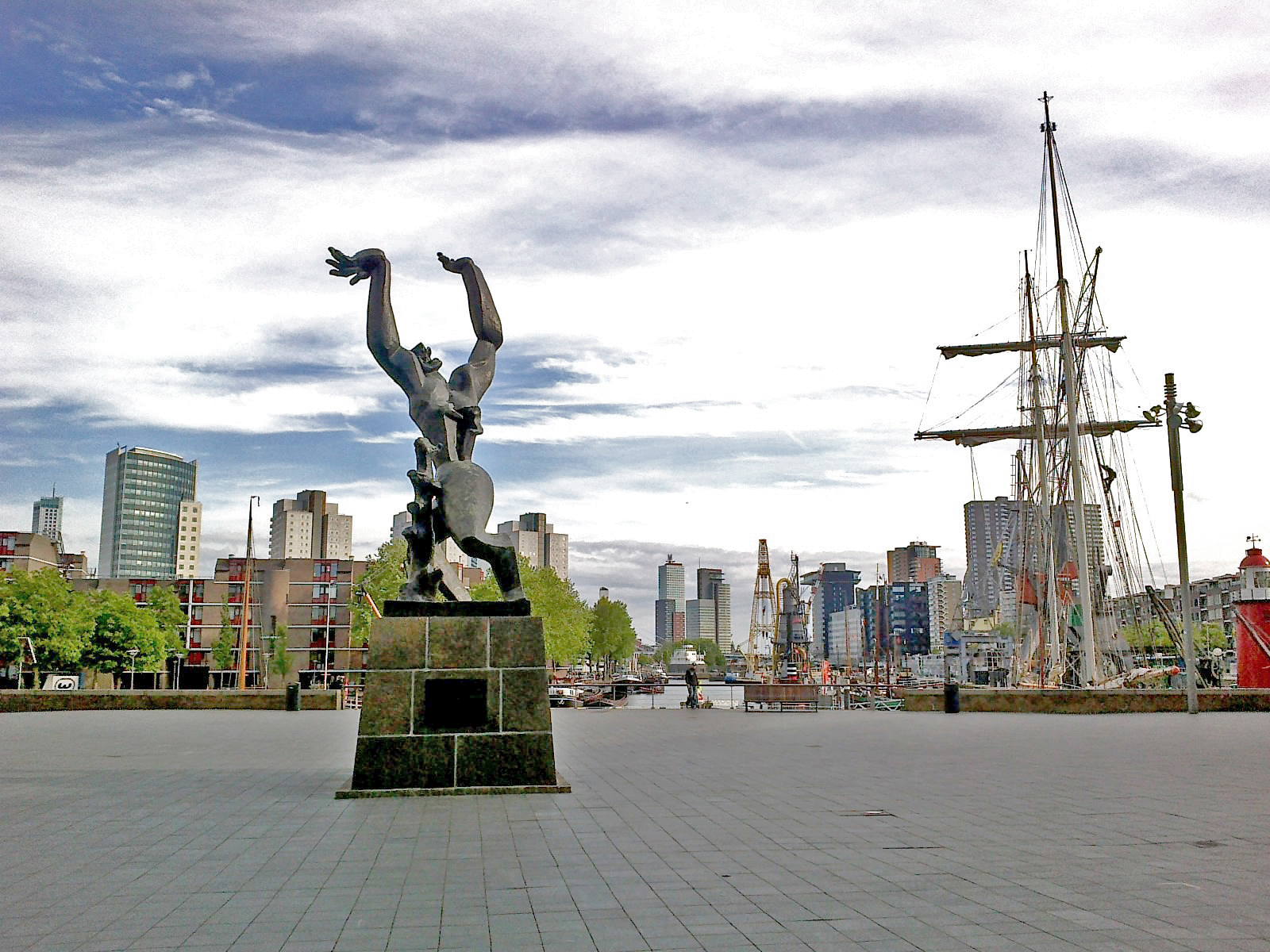 Pays-Bas Rotterdam Leuvehaven De Verwoerste Stad